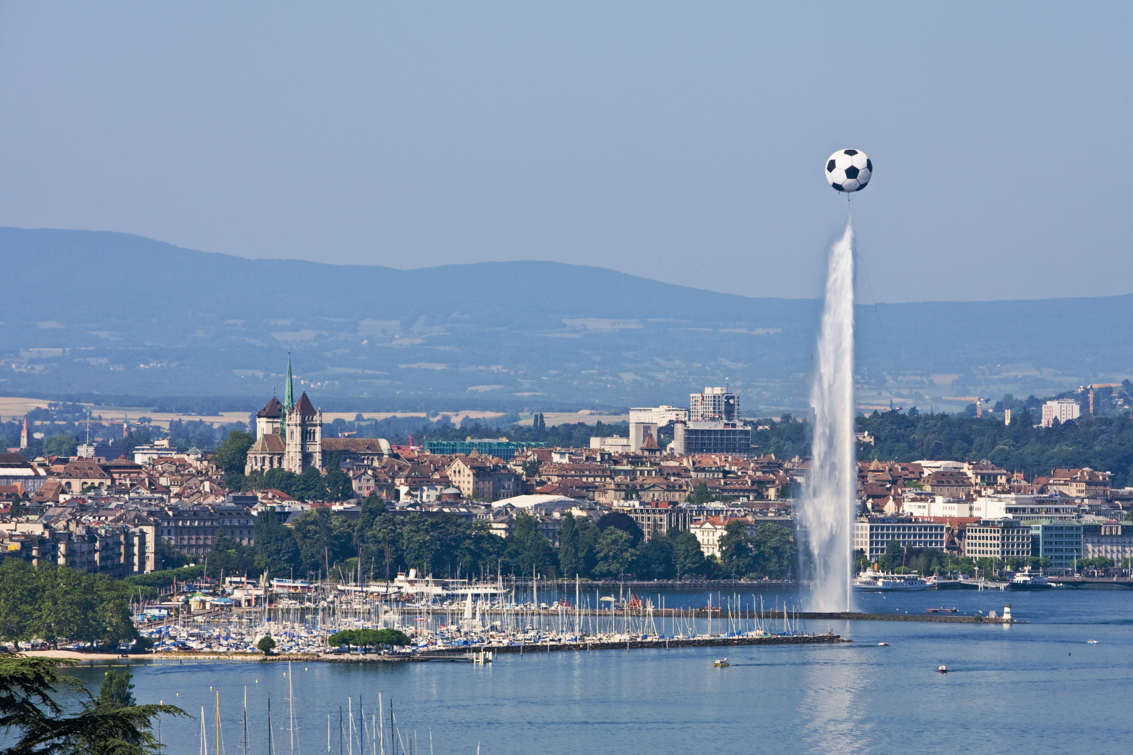 Die Altstadt von Genf, gesehen von einer Anhöhe in ColognyDer Fussball über dem Springbrunnen verdeutlicht Genf als Gastgeberstadt der Fussball-Europameisterschaft 2008